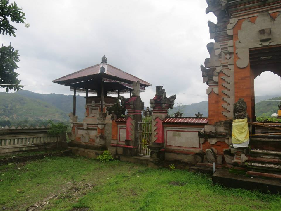 Hindutempel in Dili